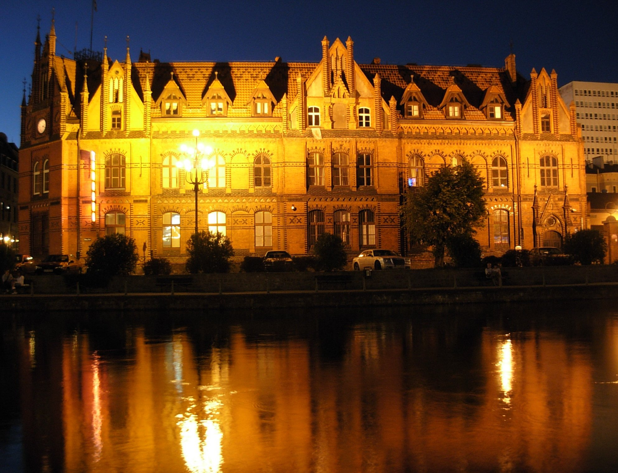 Poczta Główna w Bydgoszczy